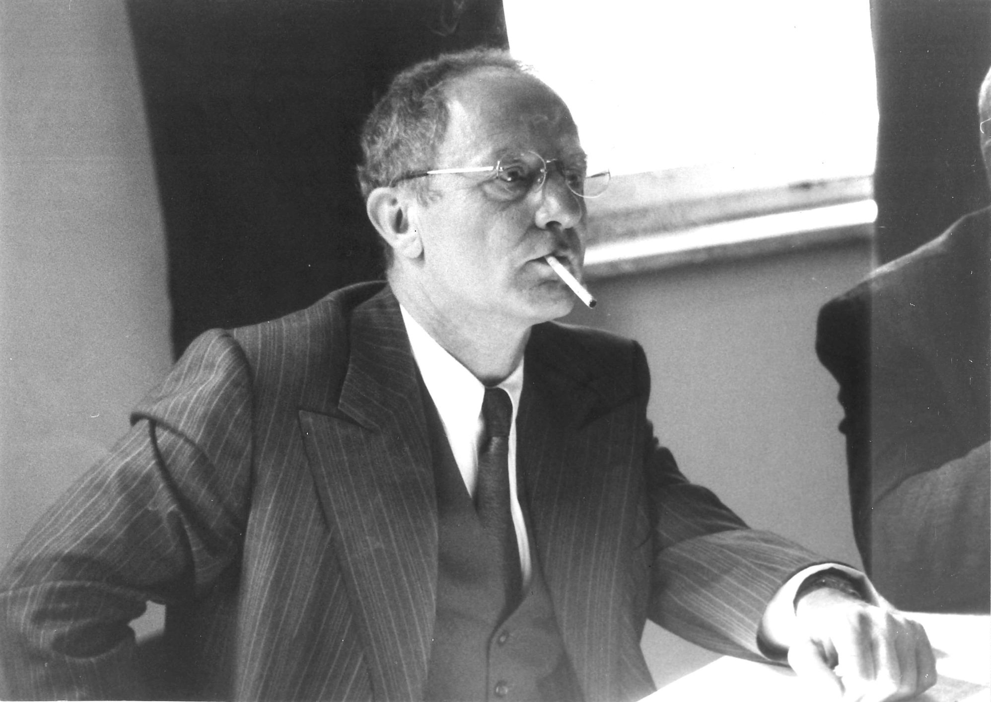 Der Schauspieler Jürgen Hentsch während einer Hörspielproduktion between 1990 and 1995 date QS:P,+1990-00-00T00:00:00Z/8,P1319,+1990-00-00T00:00:00Z/9,P1326,+1995-00-00T00:00:00Z/9 in einer Aufnahme des Berliner Fotografen Werner Bethsold.